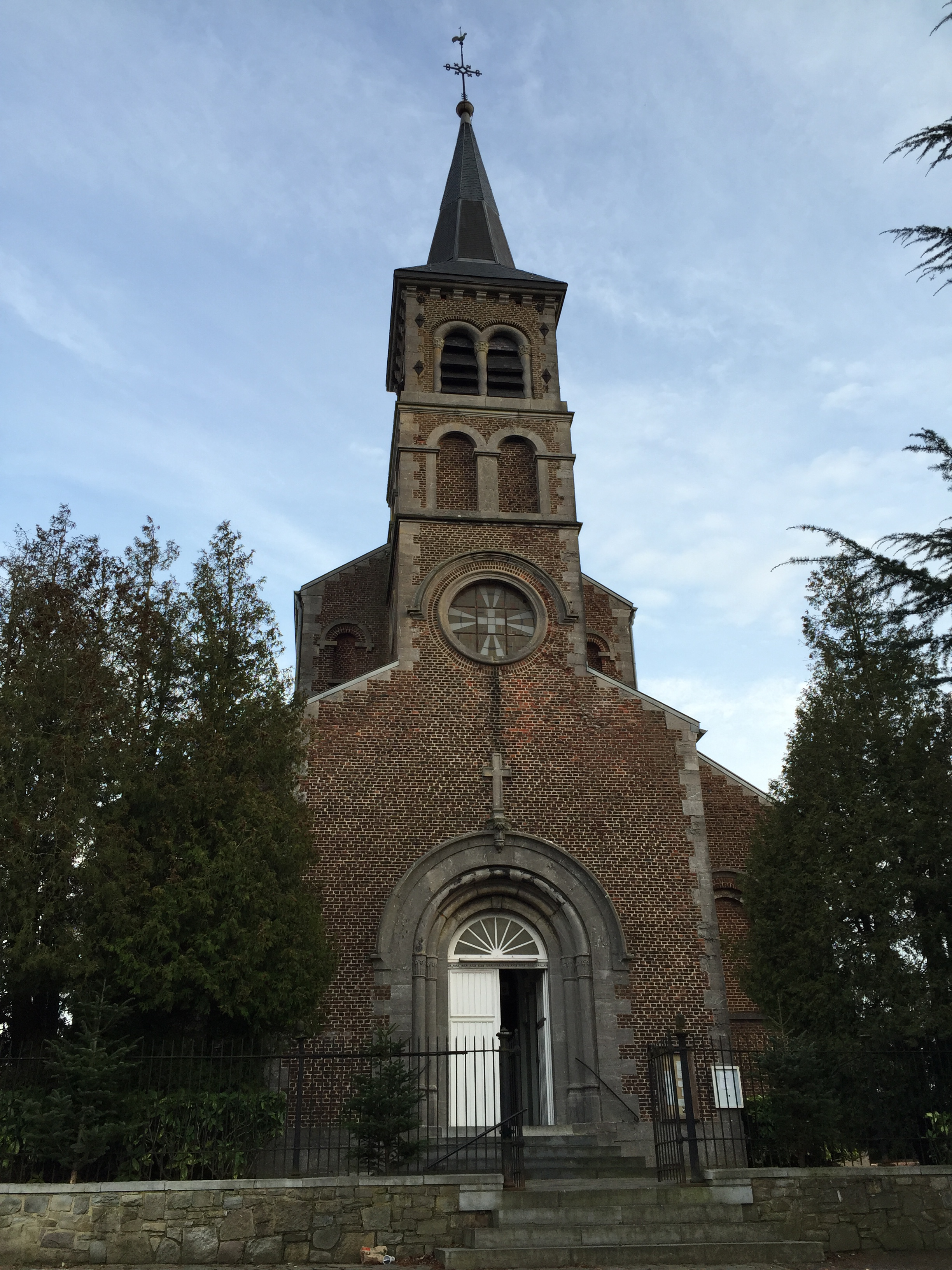 Eglise Saint-André de Jamioulx